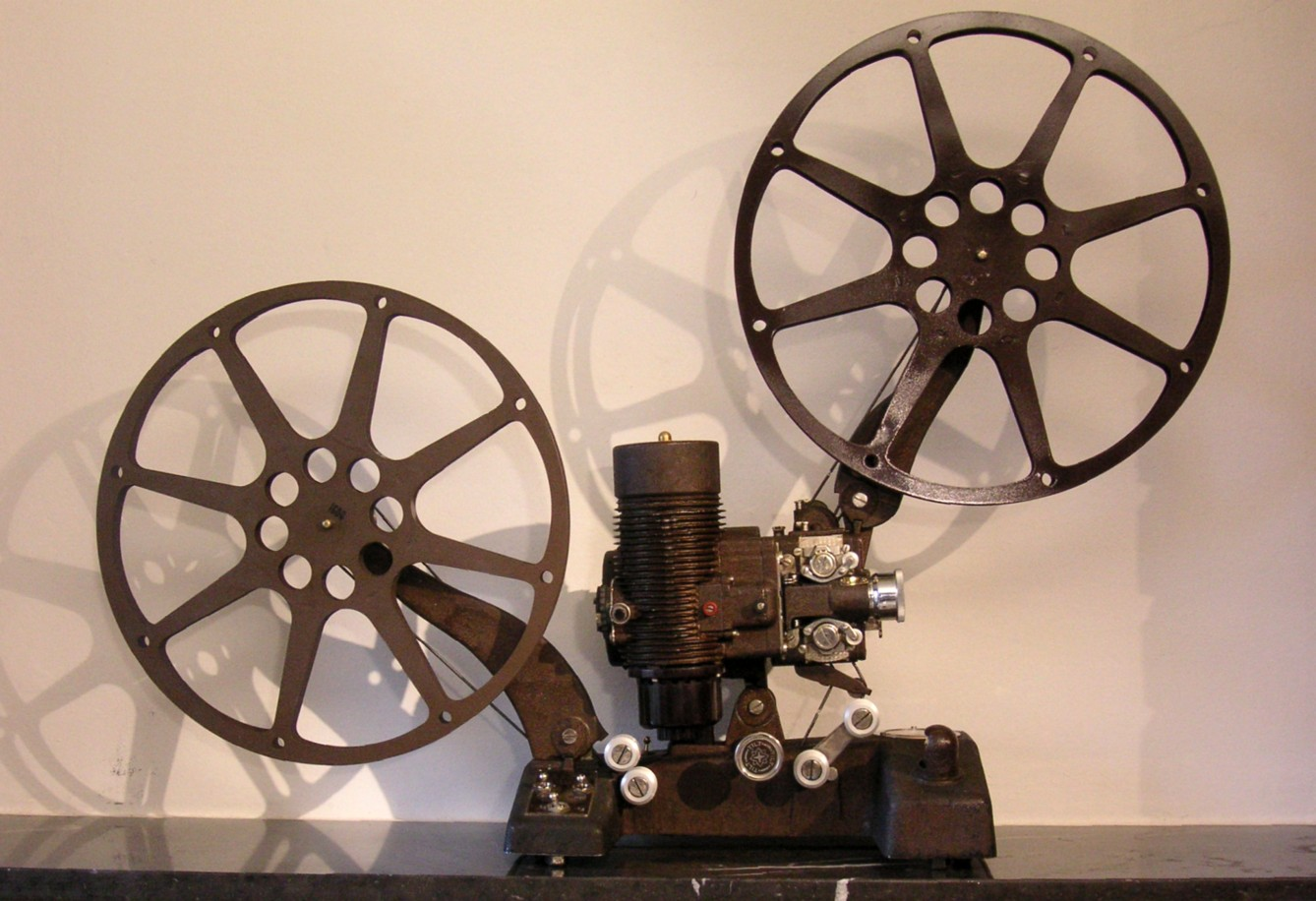 Bell & Howell stummfilmsprojektor "Filmo 129" från 1934